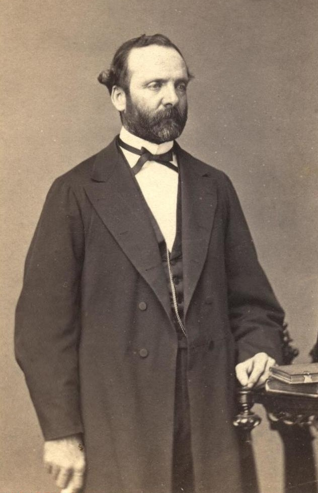 Álvaro Covarrubias Ortúzar (Santiago, 19 de febrero de 1824 - Santiago, 24 de abril de 1899) es un abogado y hombre público chileno, de tendencias liberales.